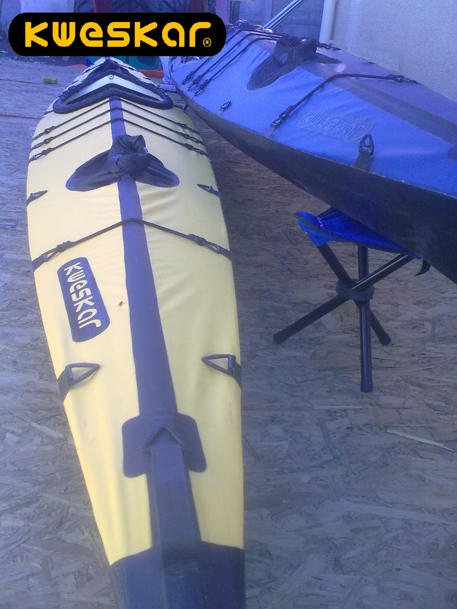 Kayaks desarmables, diseño de travesía y expedición